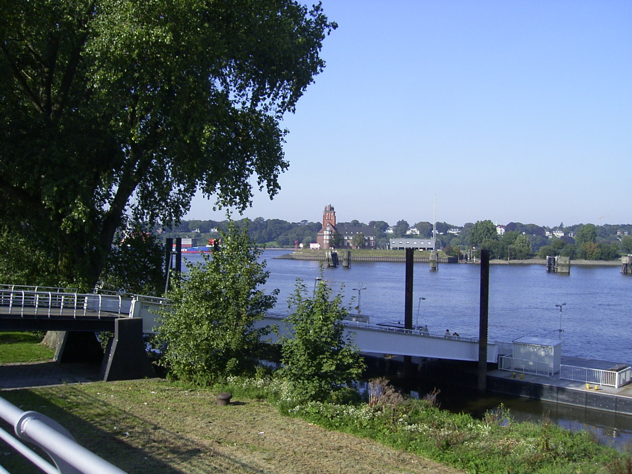 Lotsenhaus Seemannshöft an der Elbe in Waltershof von Finkenwerder aus gesehen.